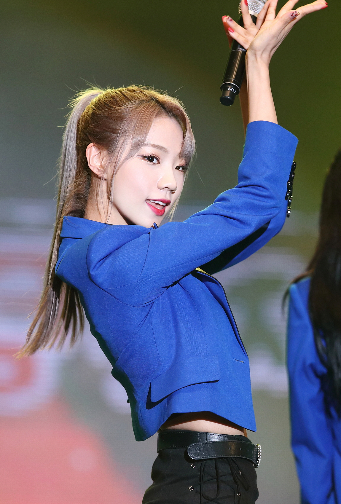 181005 우주소녀 루다 여름 청원생명축제